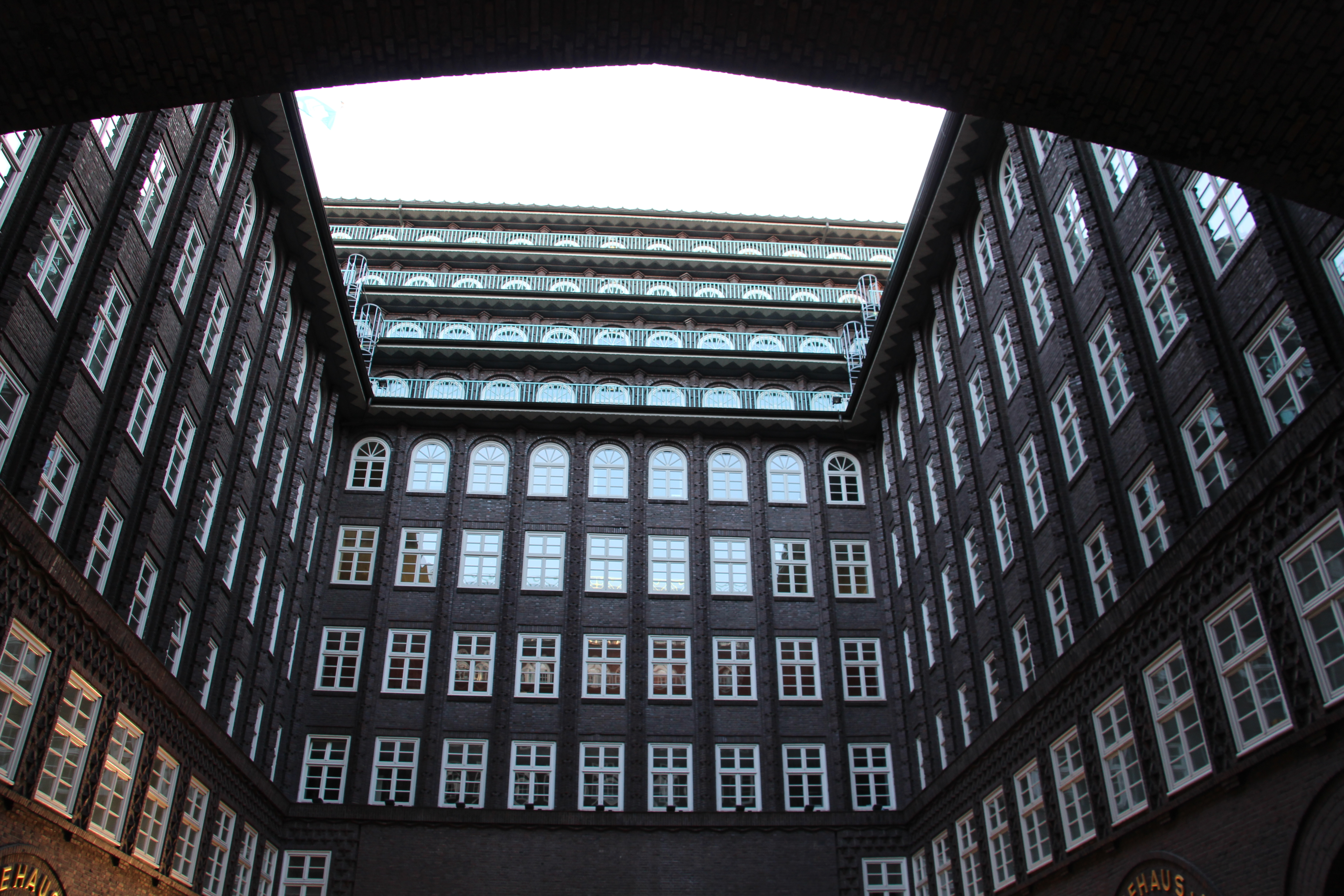 InnenhofThis is a photograph of an architectural monument.